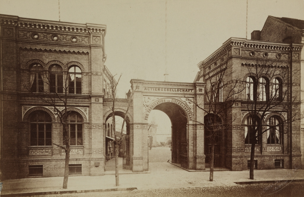 Toranlage der Aktiengesellschaft für Fabrication von Eisenbahnbedarf, Chausseestraße 11 in Berlin, Oranienburger Vorstadt; erbaut 1858-1859 nach Entwurf der Berliner Architekten Hermann Ende und Wilhelm Boeckmann